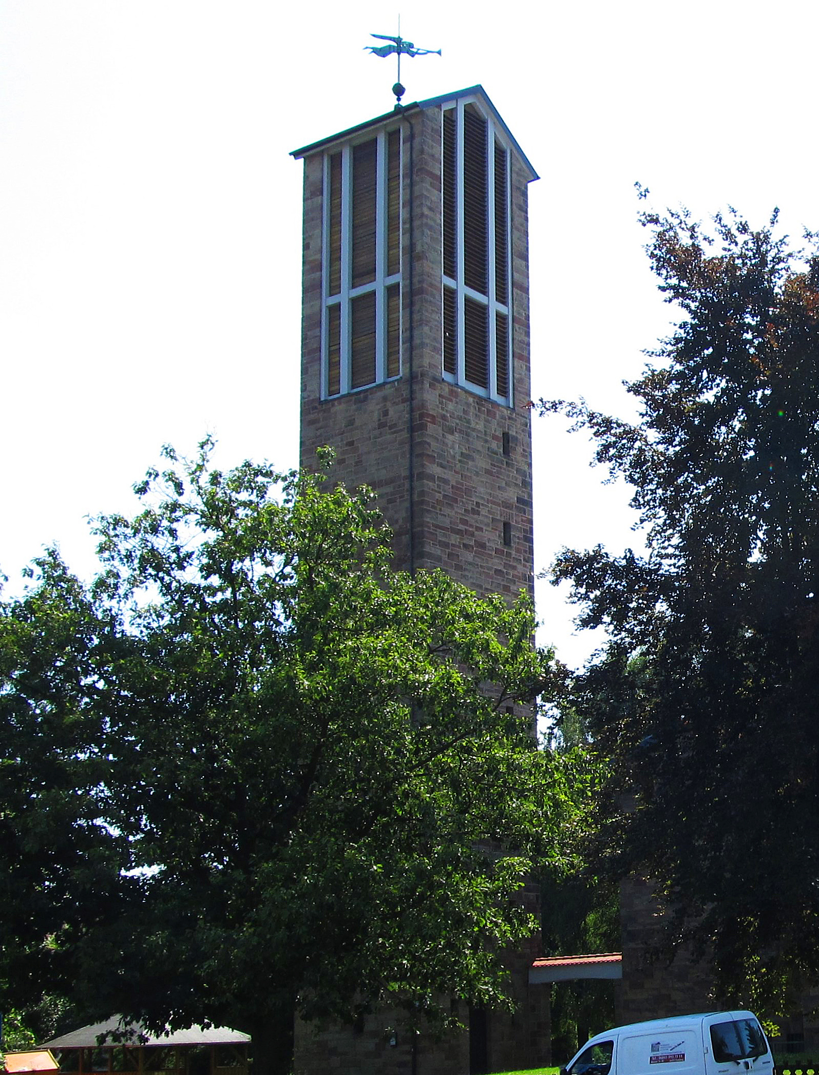 Glockenturm der kath. Pfarrkirche Maria vom Frieden in Homburg-Erbach, Saarland